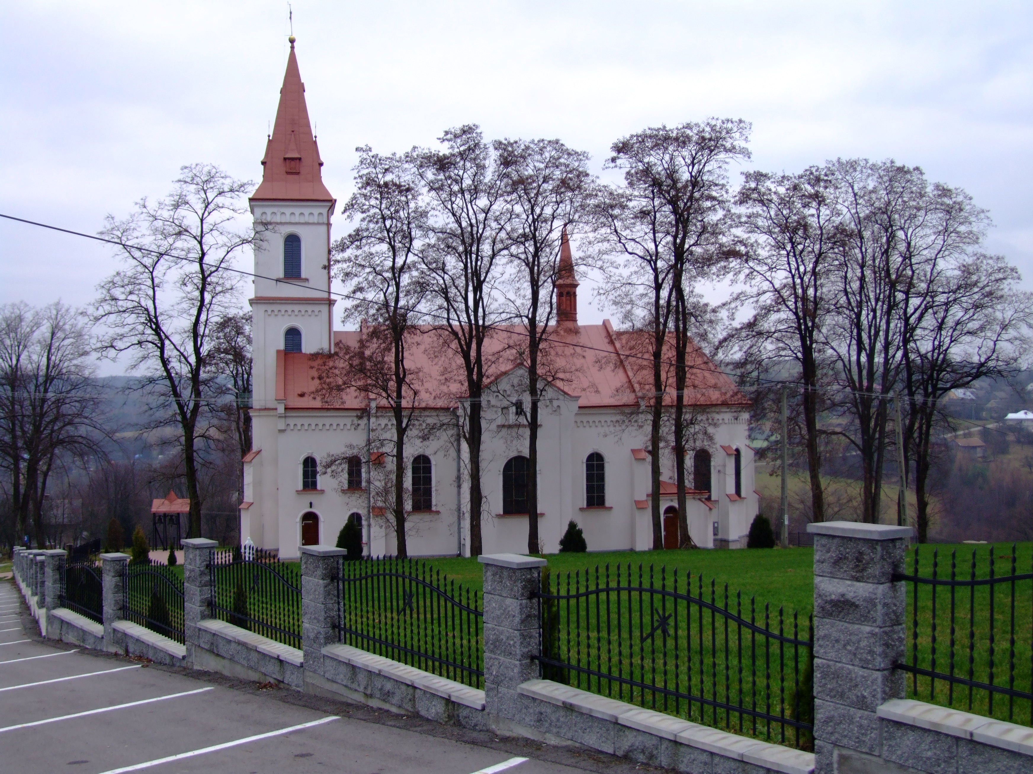 Kościół rzymskokatolicki w Dylągowej pw. św. Zofii, wybudowany w latach 1906-1911.